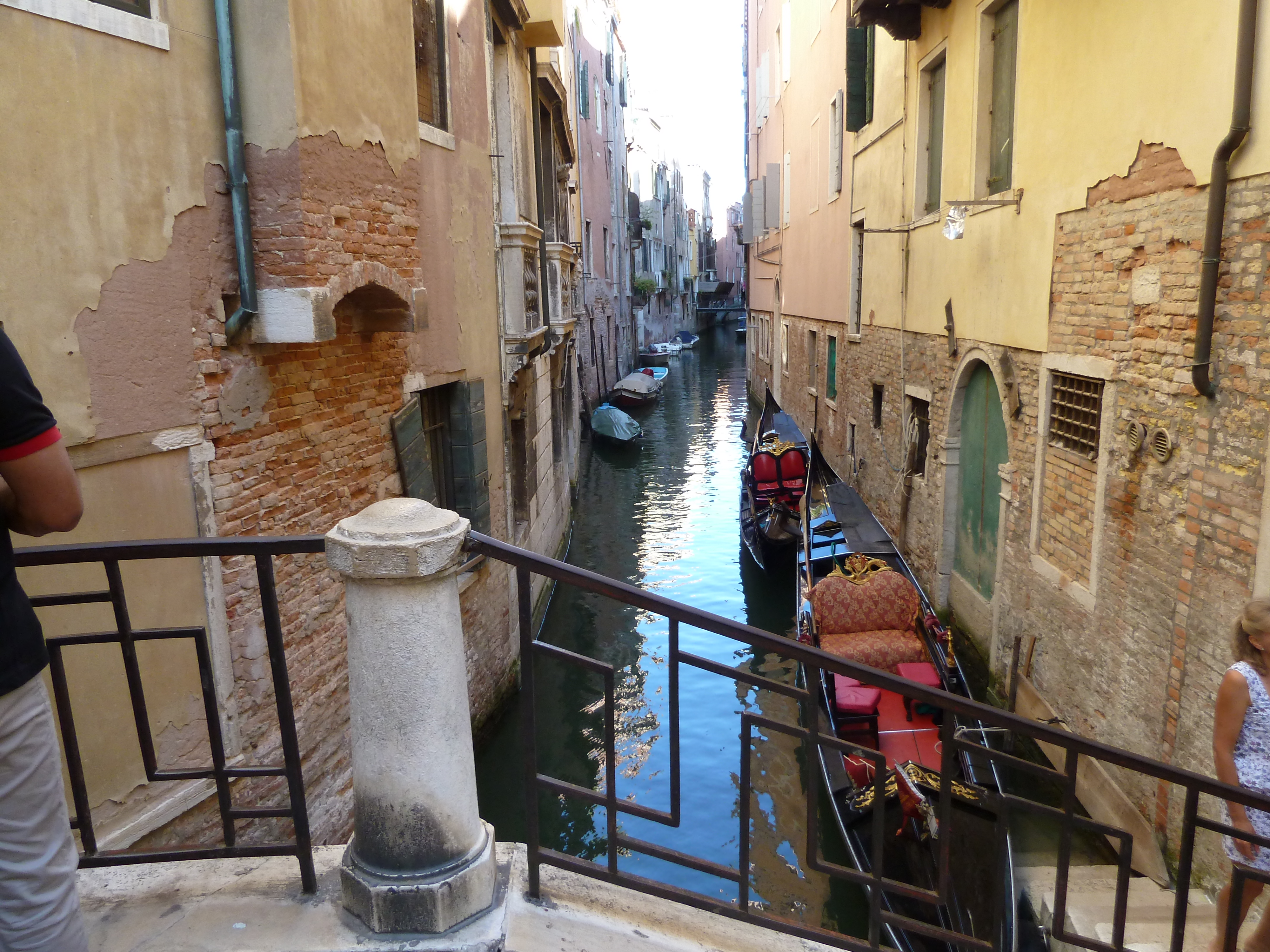 Rio San Giovanni Crisostomo (Venice)